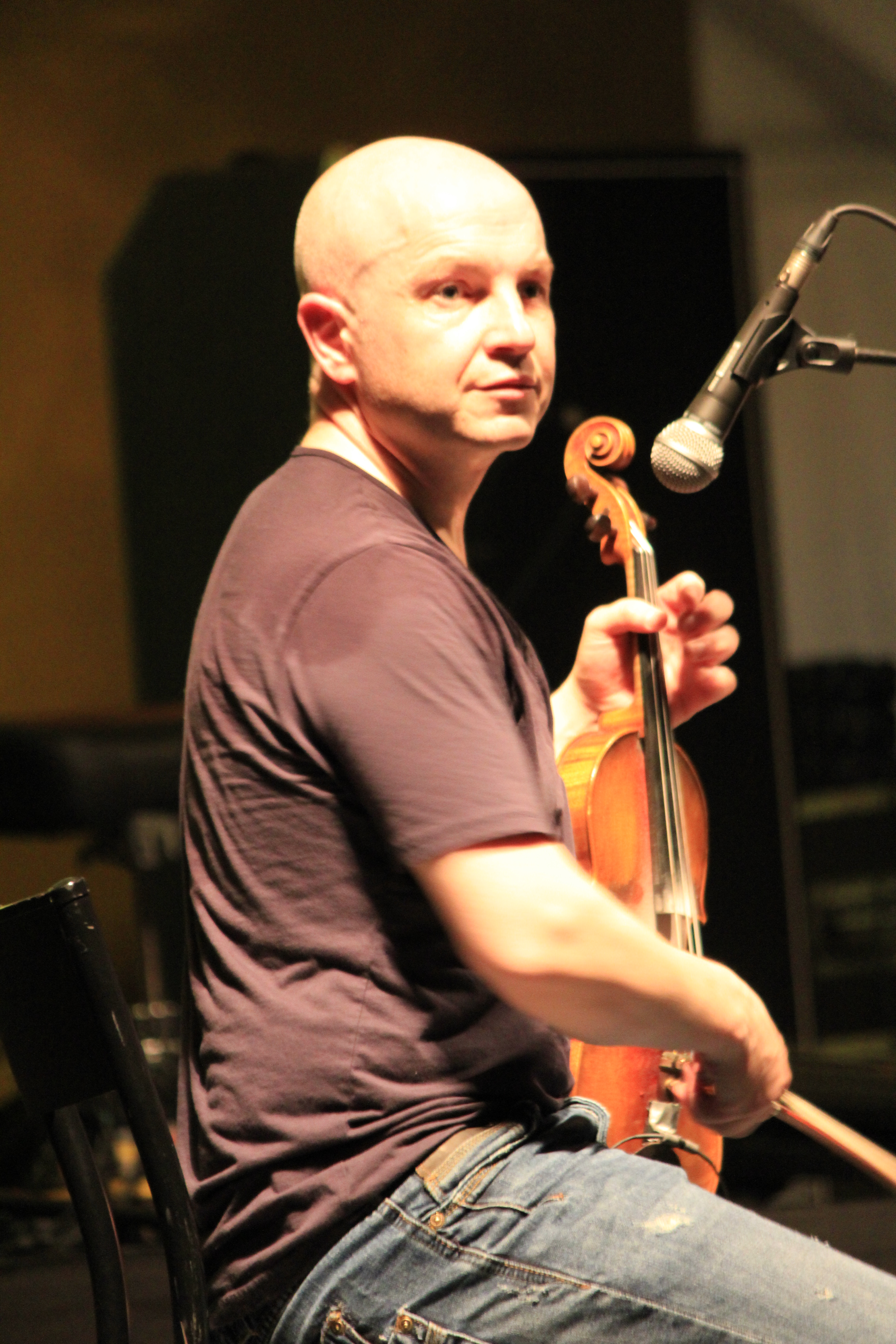 John Mc Cusker lors d'un concert au Festival interceltique de Lorient réunissant Michael Mc Goldrick, John Mc Cusker, et John Doyle